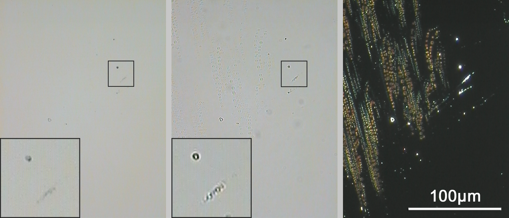 Fingerabdruck auf Objektträger: Hellfeldabbildung mit geöffnetem Kondensor (links) und geschlossenem Kondensor (Mitte), Dunkelfeld (rechts). Die kleinen Bilder stellen Vergrößerungen eines Ausschnitts dar, um Beugungsartefakte an Partikeln und Kratzern durch zu weit geschlossene Kondensorblende zu veranschaulichen. Durch die stark geschlossene Konsensorblende werden außerdem diffuse dunkle Flecken erzeugt, die von Verunreinigungen der Deckglasunterseite stammen. Dunkelfeldabbildung zeigt die dünnen Fetttröpfchen am Besten, Partikel und Kratzer sind in der Dunkelfeldabbildung überstrahlt. Aufgenommen mit Zeiss Axiophot, Objektiv 20x, Durchlicht